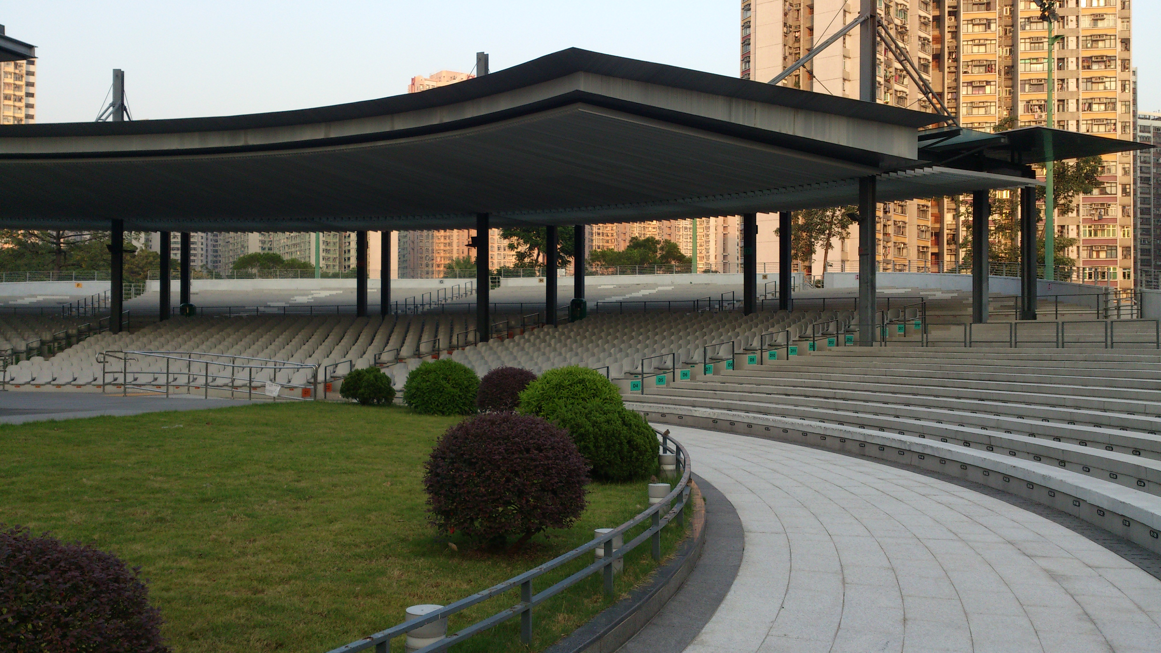 摩士公園4